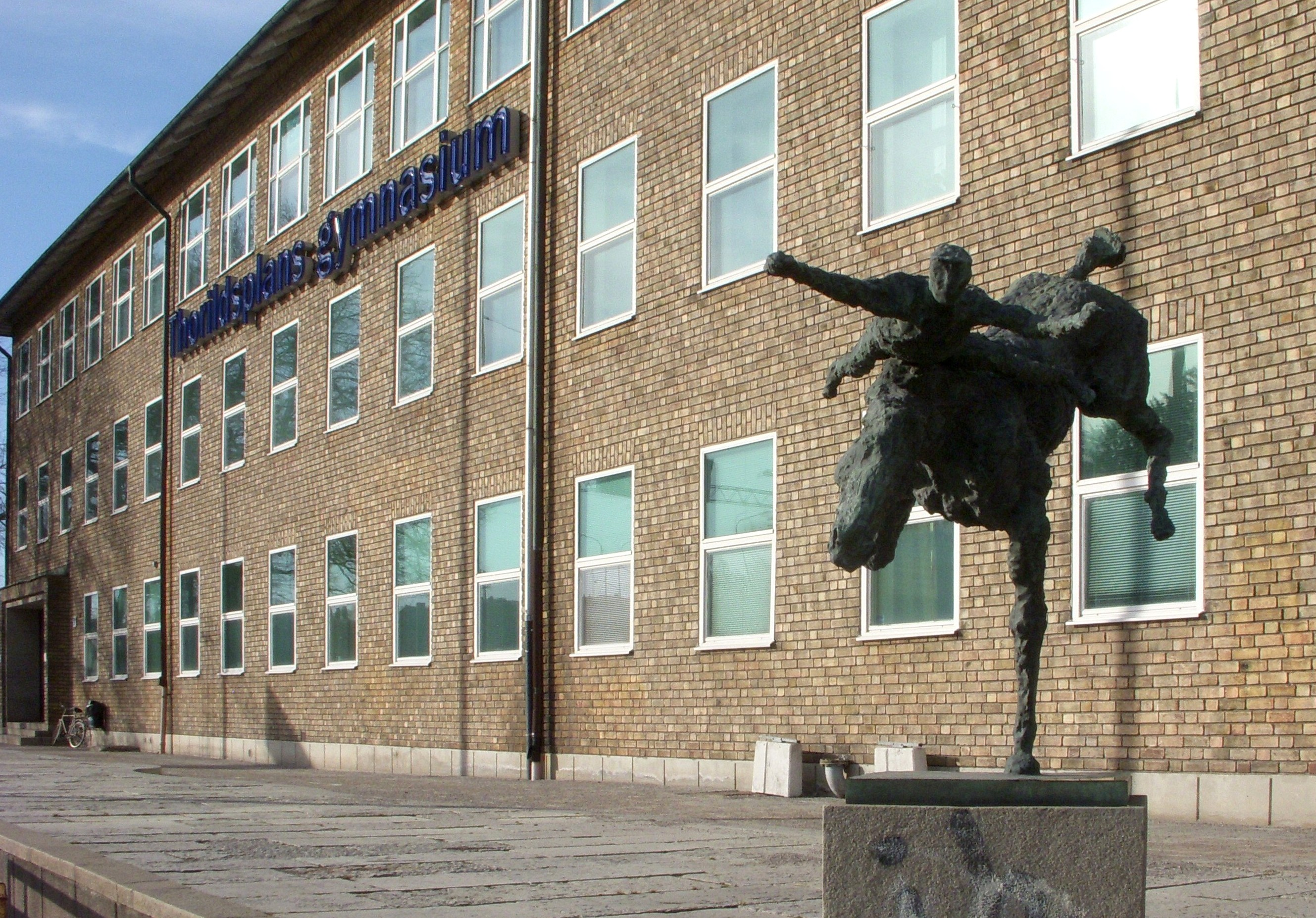 Thorildsplans gymnasium, Stockholm i mars 2012